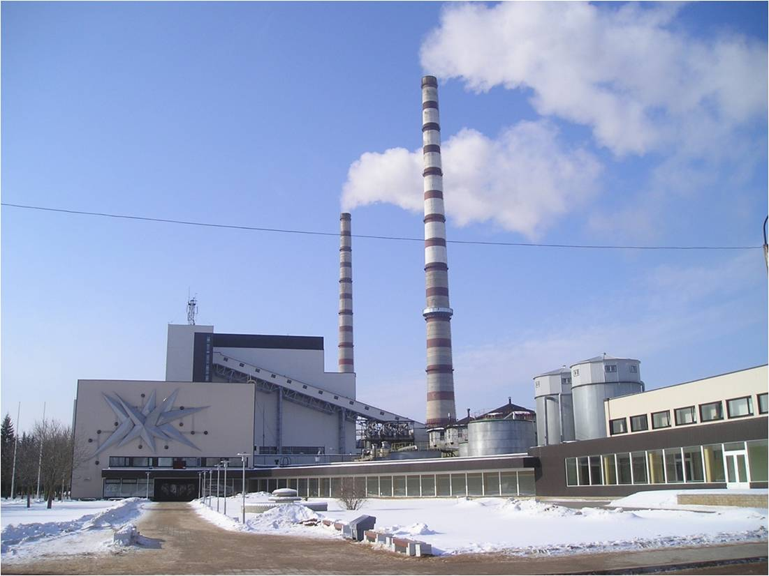 Õhusaaste Kirde-Eesti põlevkivi elektrijaamadest